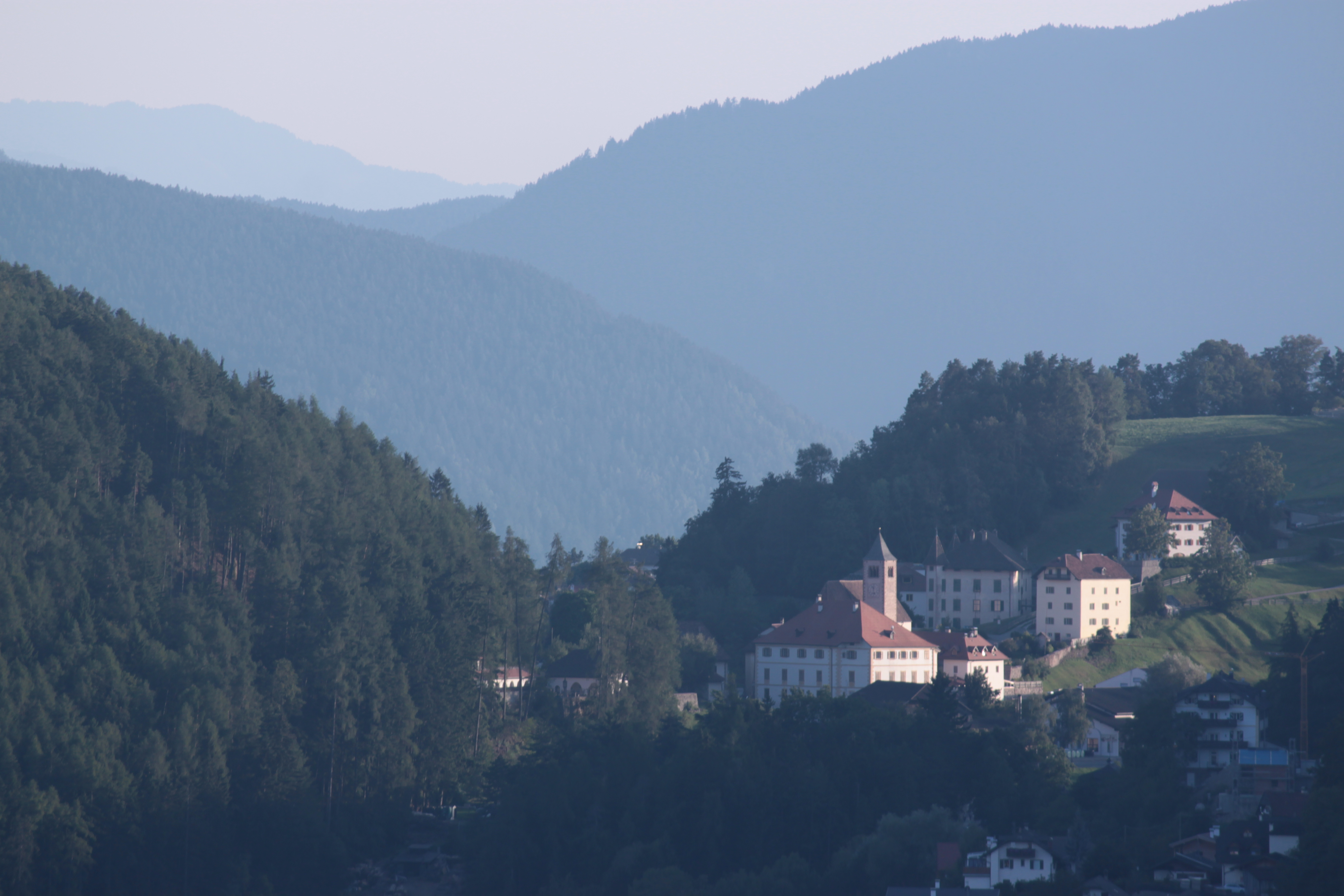 Lengmoos am Ritten